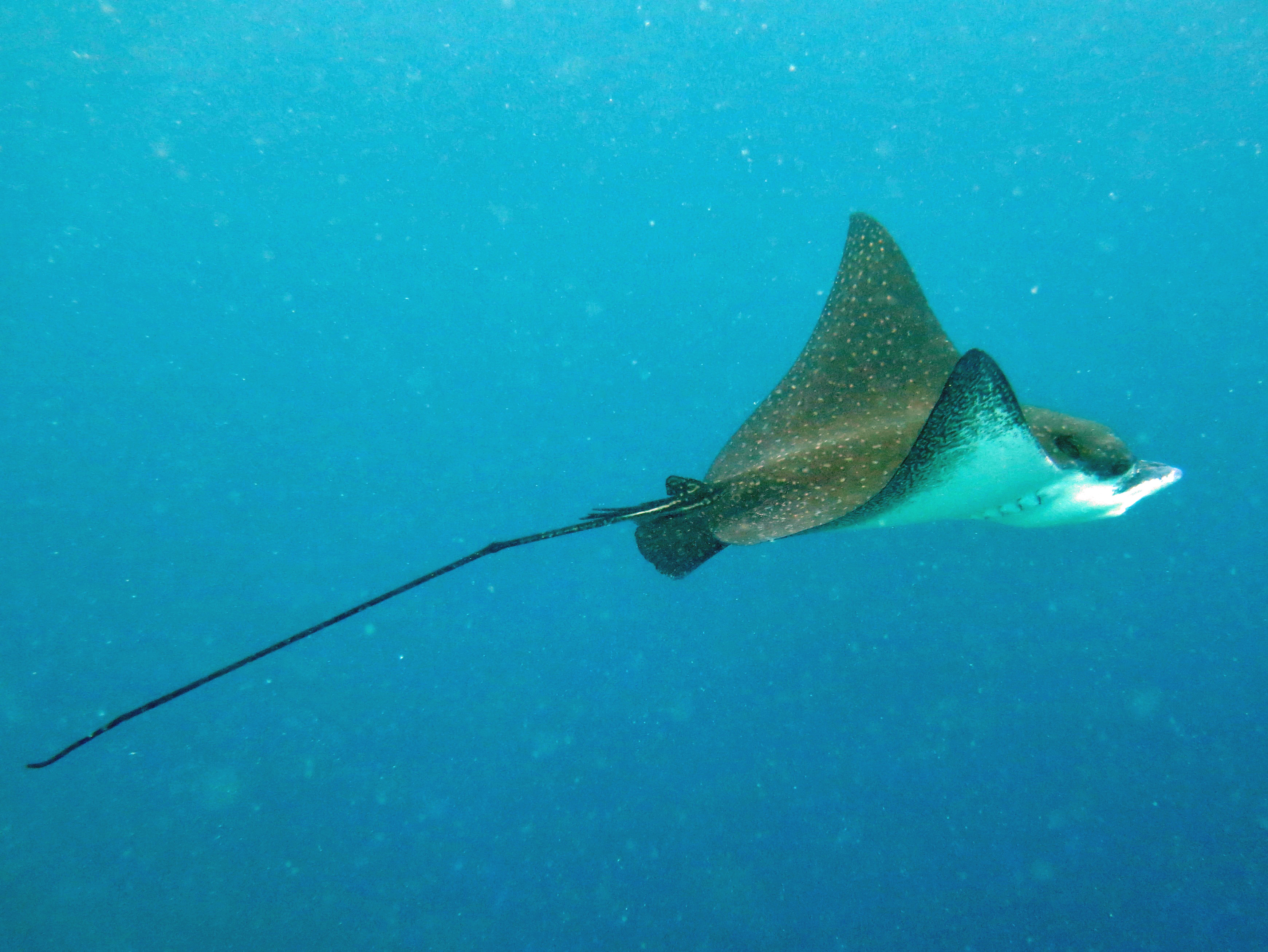 Une raie aigle (Aetobatus ocellatus) aux Maldives (Milhaidhoo, atoll de Baa).